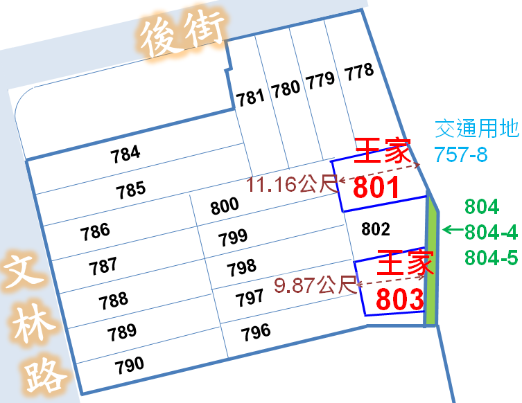 中文（台灣）: 文林苑基地位置說明。 1.依照臺北市土地使用分區管制規則，王家的土地為使用分區為第一種商業區，其平均深度不足15公尺，不符第一種商業區法定平均深度之規定，非與鄰地合併補足或整理後不得建築。[ 2.王家2塊土地所臨接的道路寬度均不足3.5公尺，亦不符「臺北市面臨現有巷道申請建築原則」。